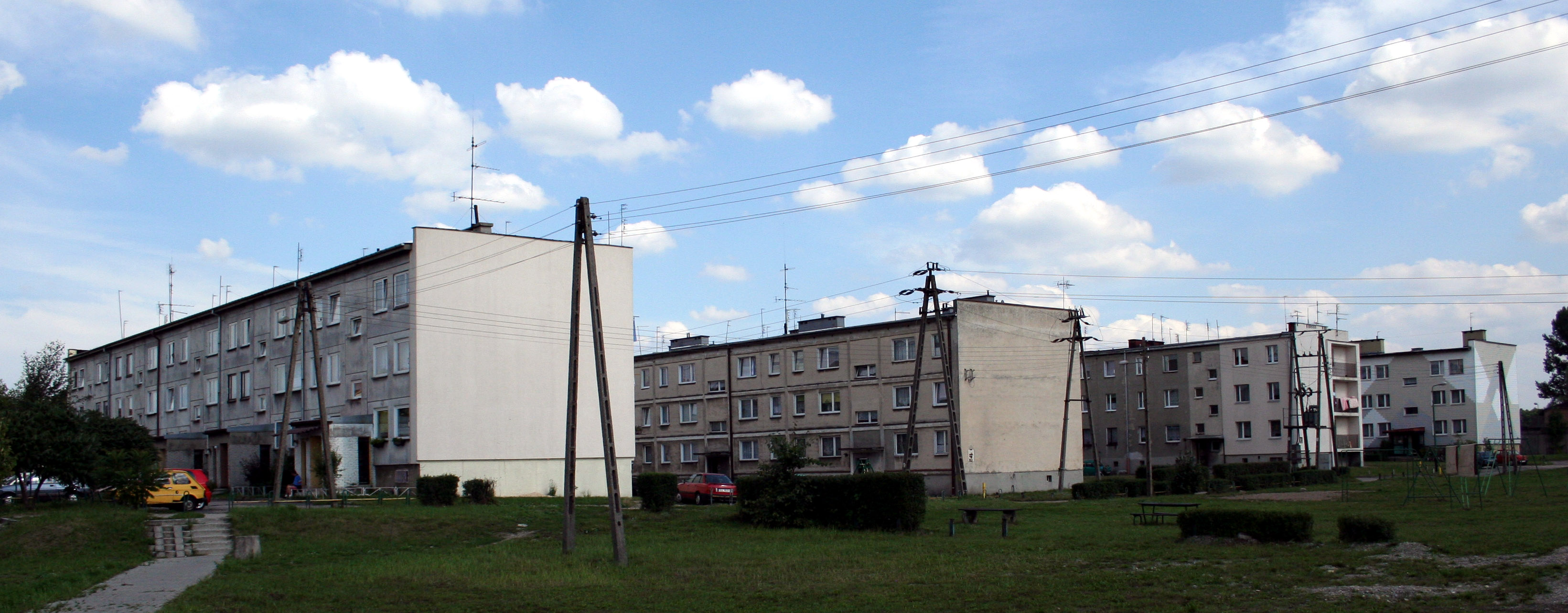 fragment miejscowości Lisów - blokowisko